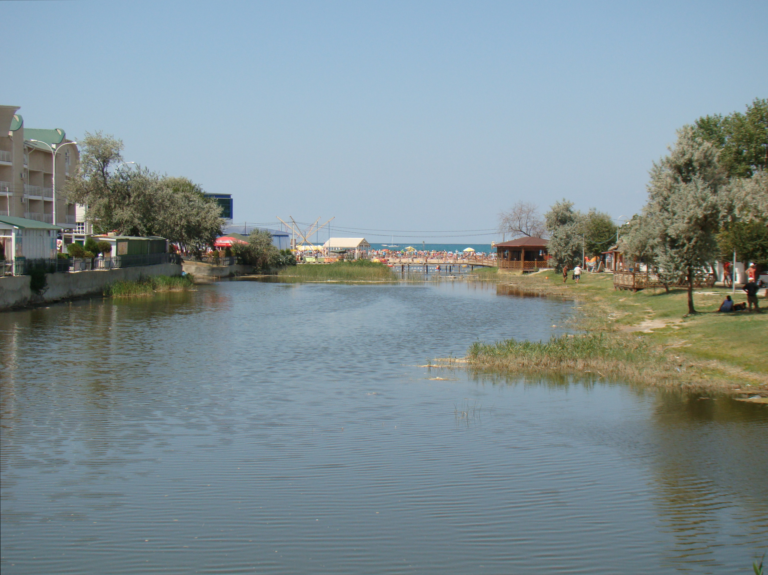 Устье реки Анапки. Город Анапа, Краснодарский край, Россия.